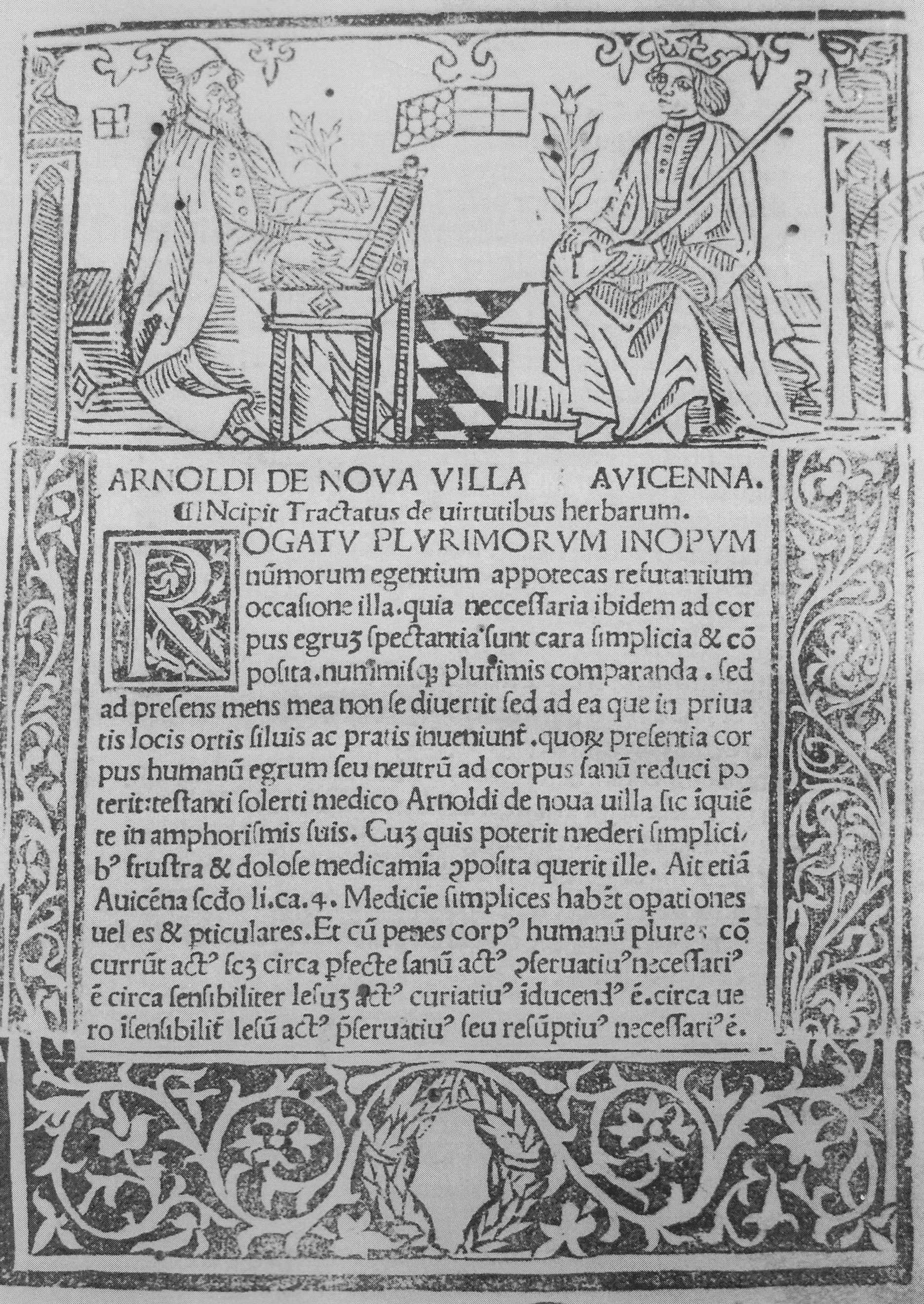 Titelseite des "Herbarius Moguntinus", Nachdruck Vicenca 1491